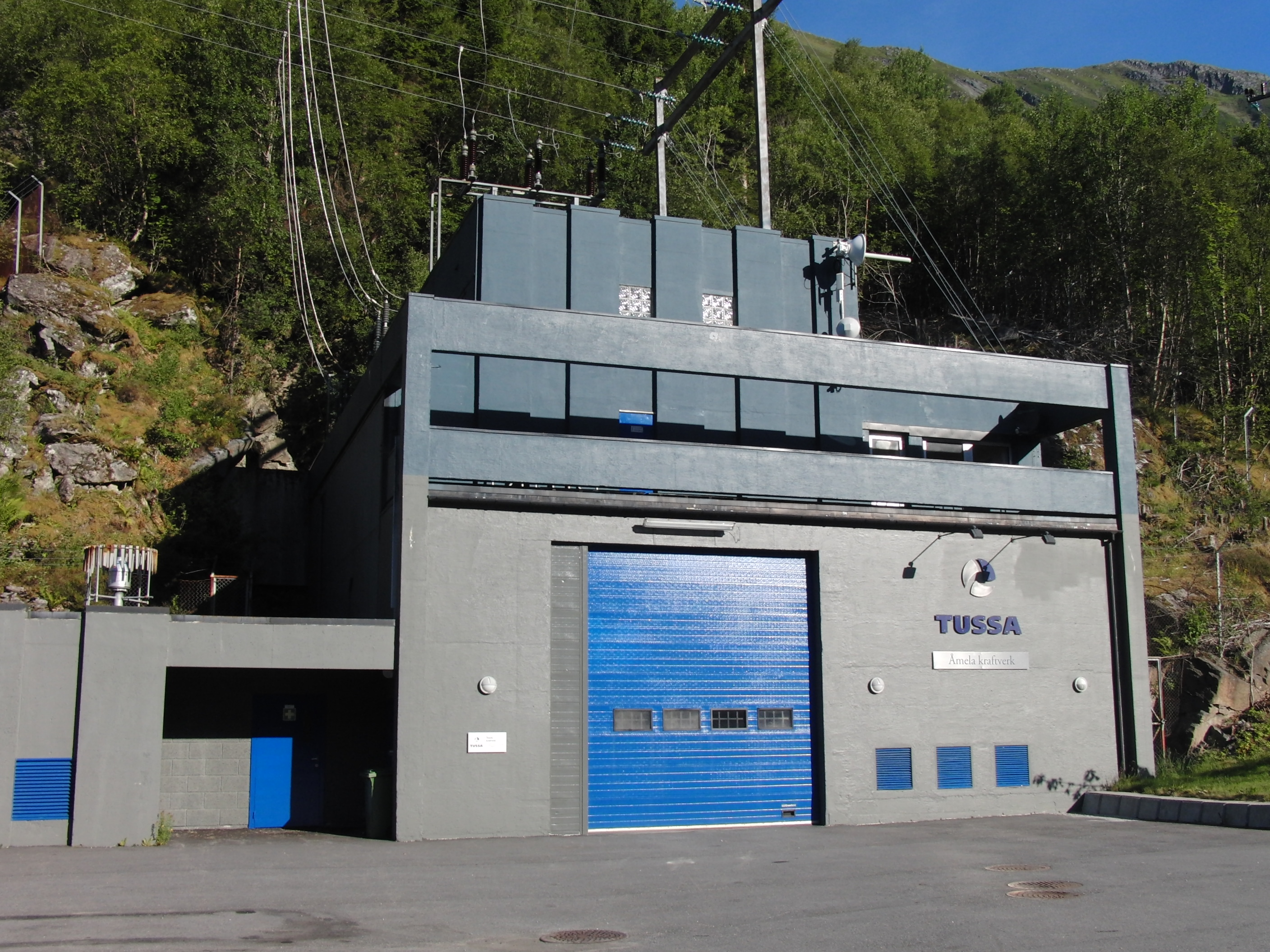 Åmela kraftverk